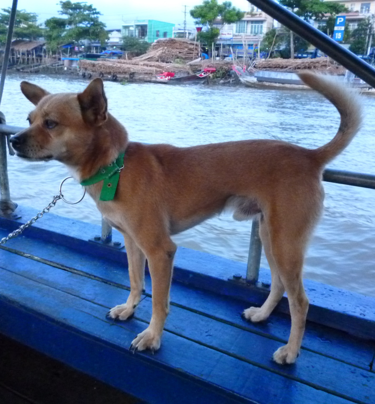 Hình chụp một con chó Việt Nam bằng máy ảnh cá nhân